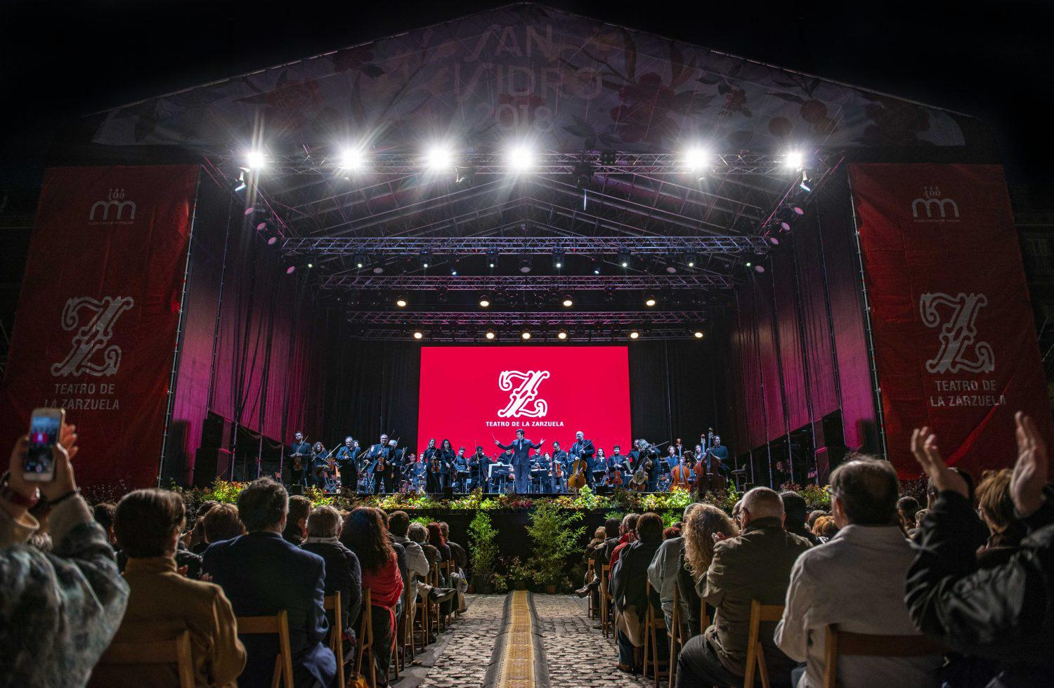 La noche del domingo arrancaba en las plazas de Madrid en calles y plazas con danza y poesía muy contemporánea. Más tarde los grandes escenarios se llenaban de música de gran diversidad para invitar a celebrar a toda la ciudadanía.